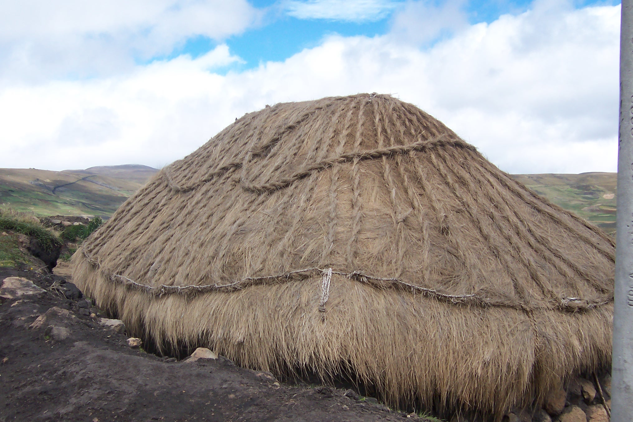 Techo de paja tradicional, a 3800 msnm camino al Parque Nacional Sangay. Provincia de Chimborazo, Ecuador